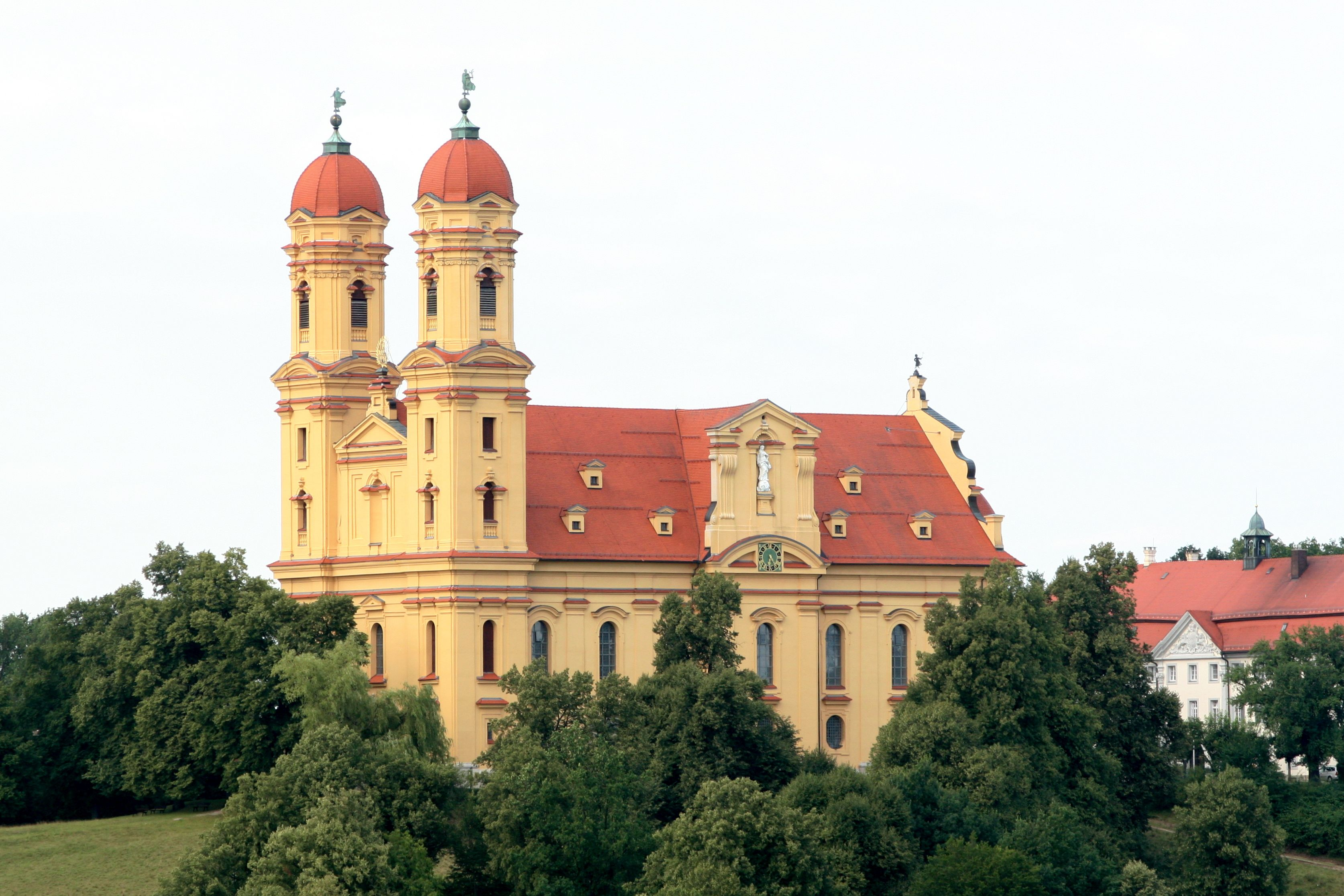 Schönenbergkirche Ellwangen, vom Schloss aus fotografiert